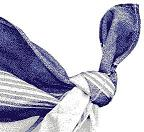 Noeud